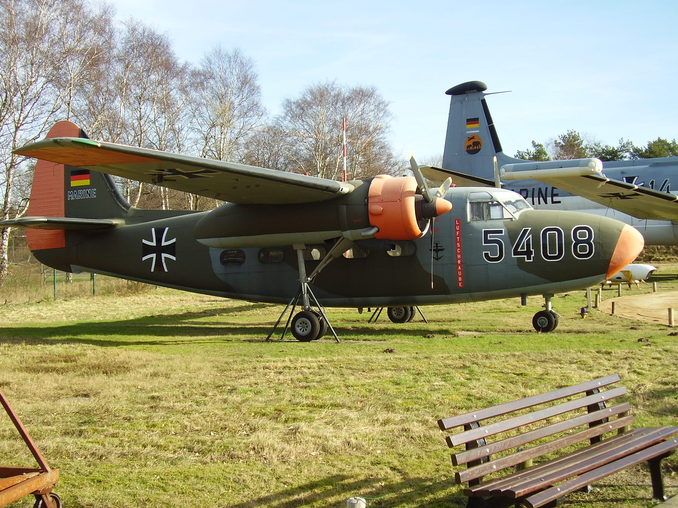 Aeronauticum in Nordholz, Luftschiffe, Zeppelin, bei Cuxhaven, Luftfahrtmuseum